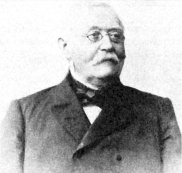 Bildnis des Berghauptmanns Ernst Hermann Ottiliae (1821–1904)